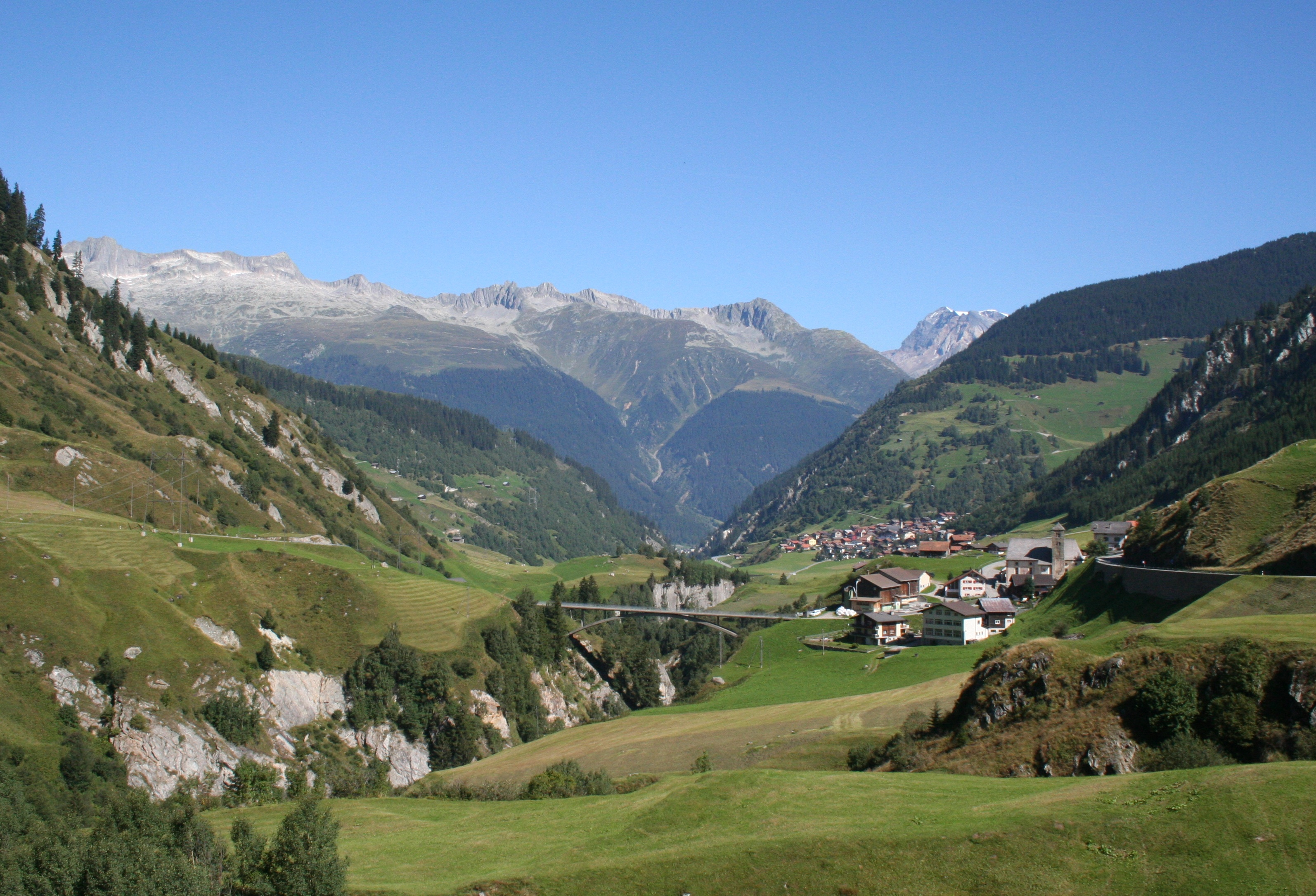 Val Medel nach Norden, rechts Platta, weiter hinten Curaglia